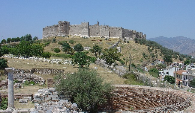 Ayasoluk Hill, Selçuk, Turkey